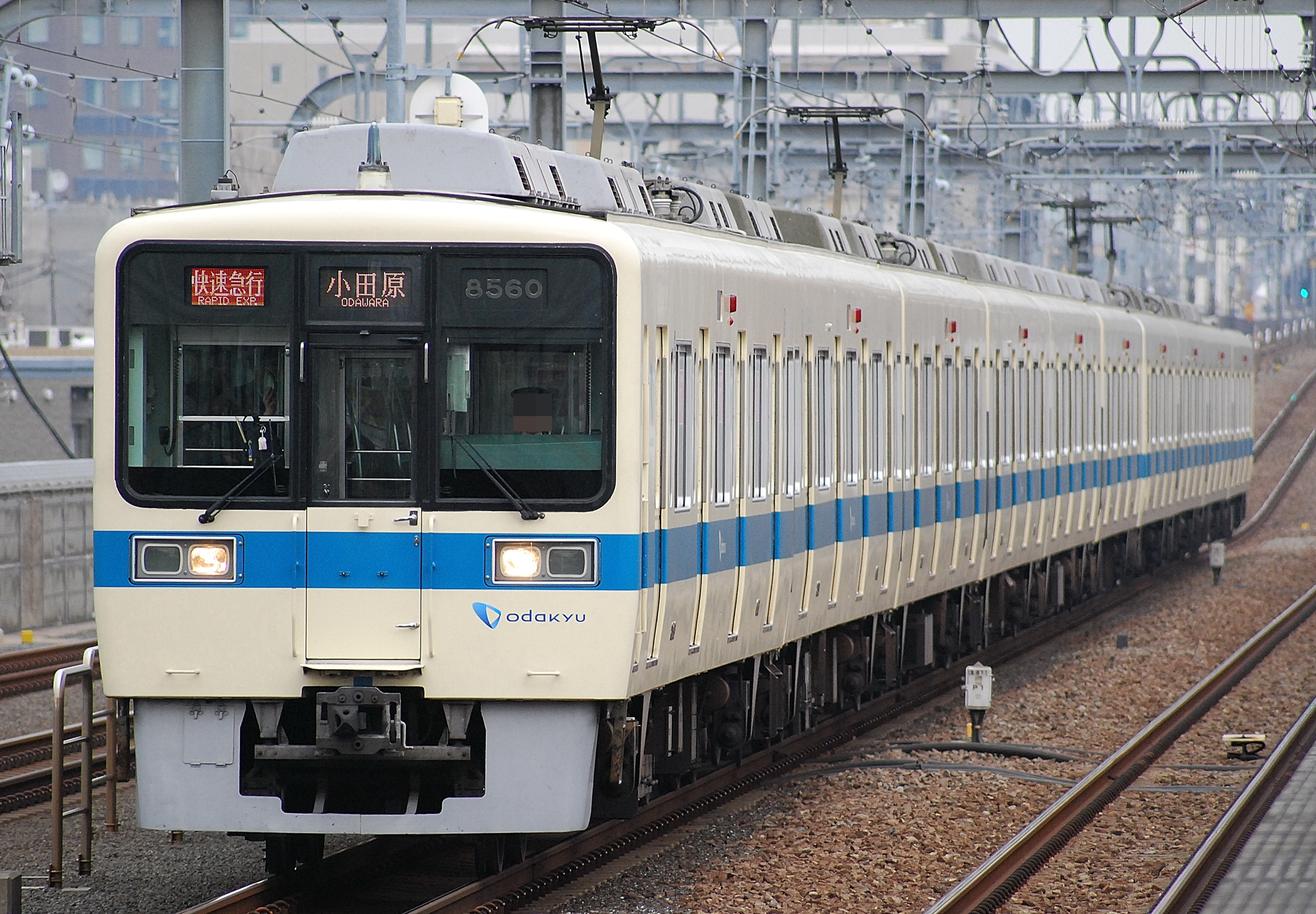 祖師ヶ谷大蔵駅を通過する小田急8000系。